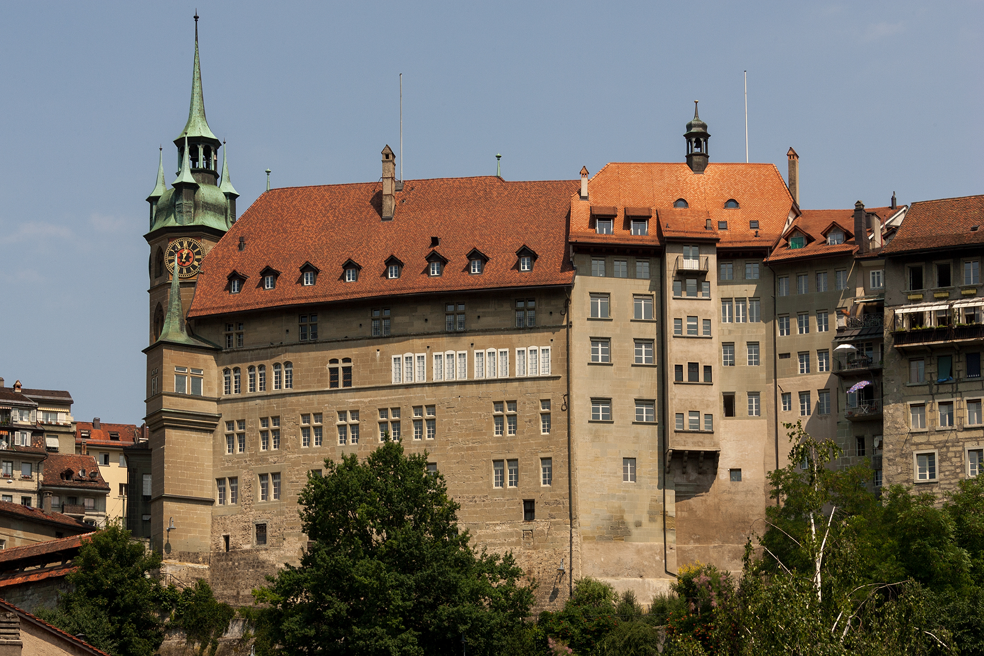 Rathaus von Fribourg